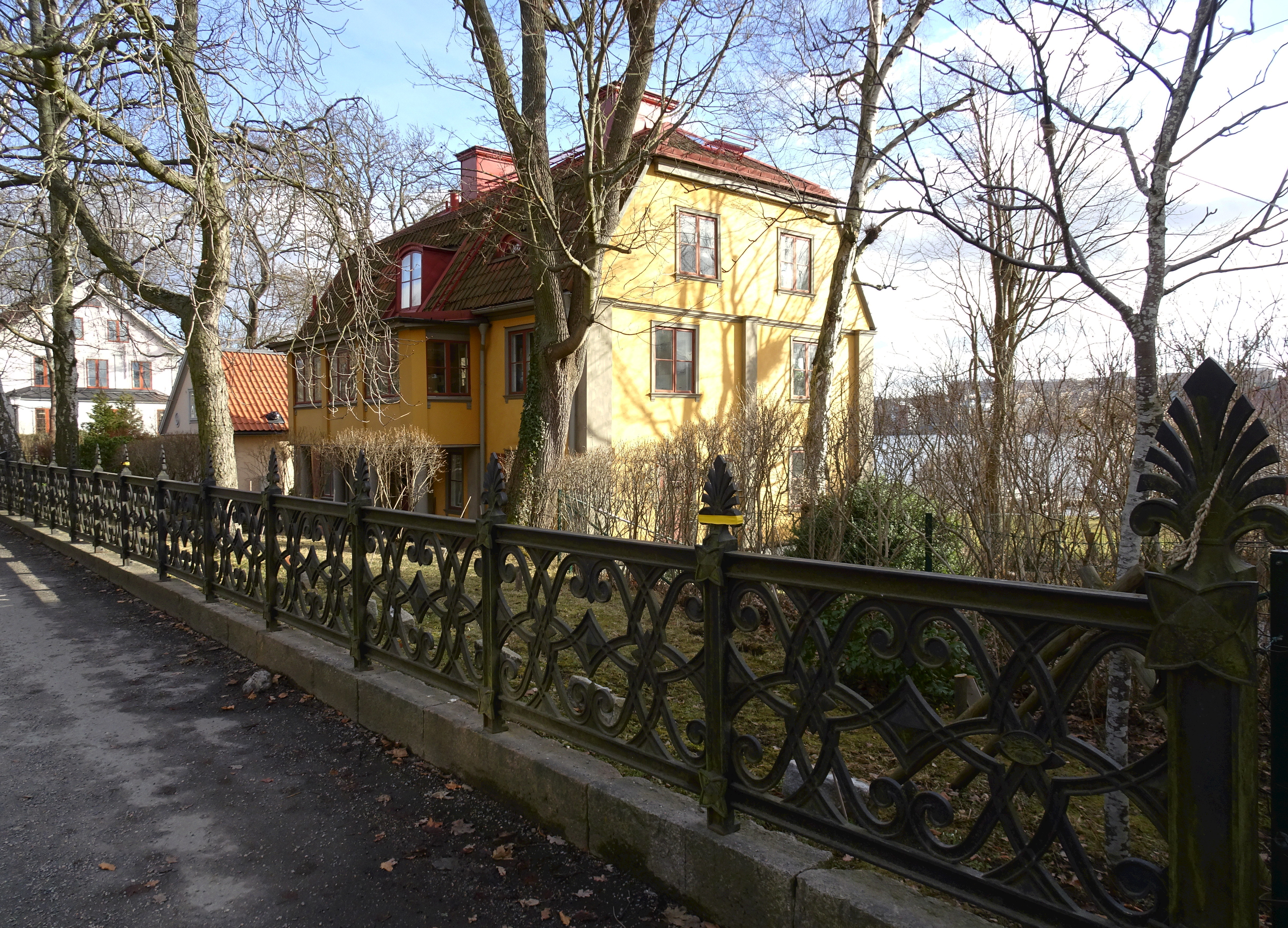 Alberget 4A, här bildades Djurgårdens IF den 12 mars 1891